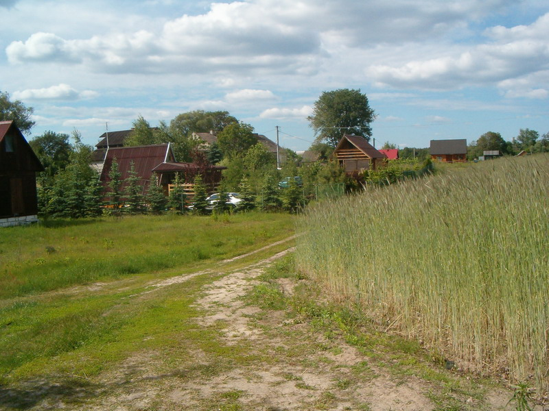 Domy w Kucharach Żydowskich